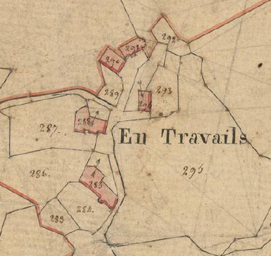 Entrevalls (Toès i Entrevalls) en el Cadastre napoleònic del 1812 (Arxius Departamentals dels Pirineus Orientals)